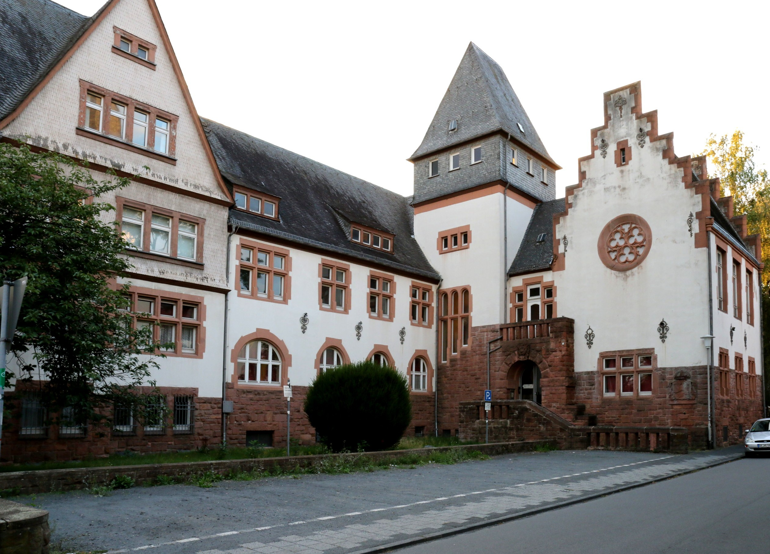 Dieburg altes Amtsgericht Vorderseite